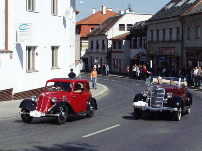 veteráni během Závod Zbraslav - Jíloviště. publikováno se svolením autorky (Jana Hrzinová)